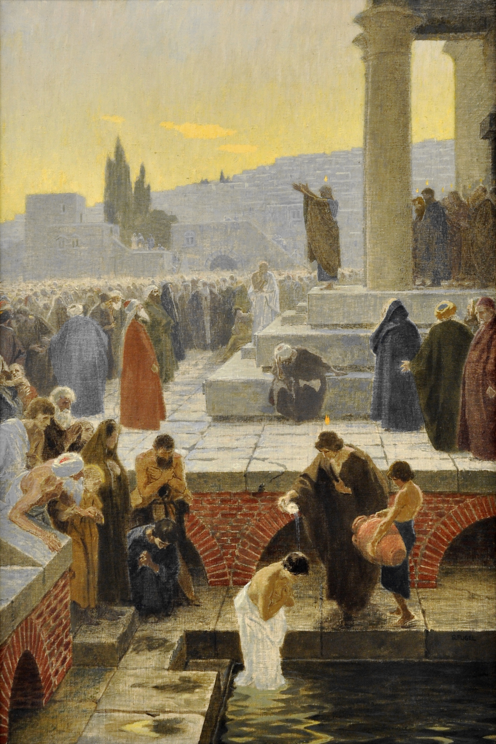 Pfingtspredigt, o.J., Stadt Ravensburg/Bavendorf